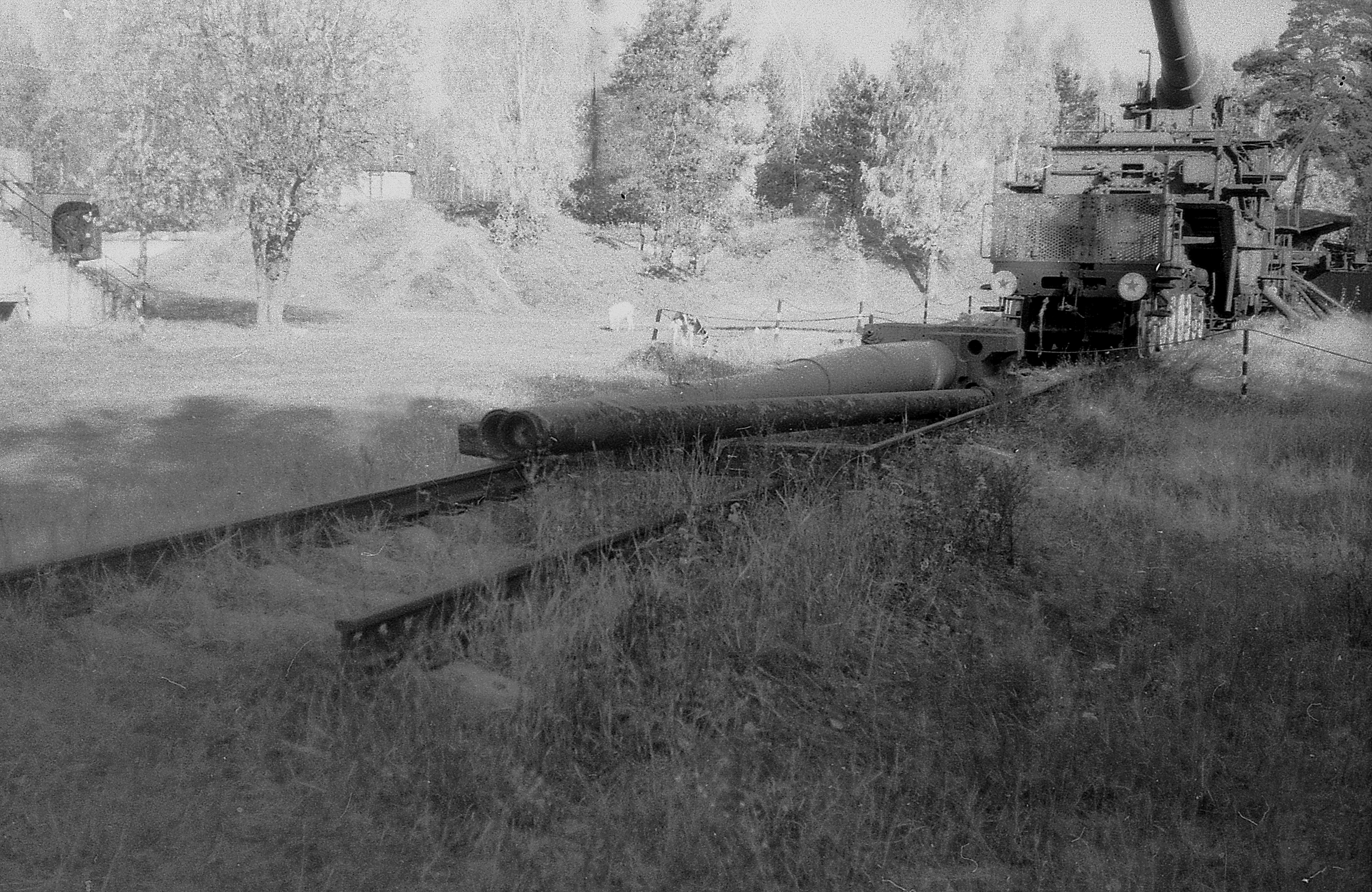 Ствол и лейнер к орудию 305 мм.